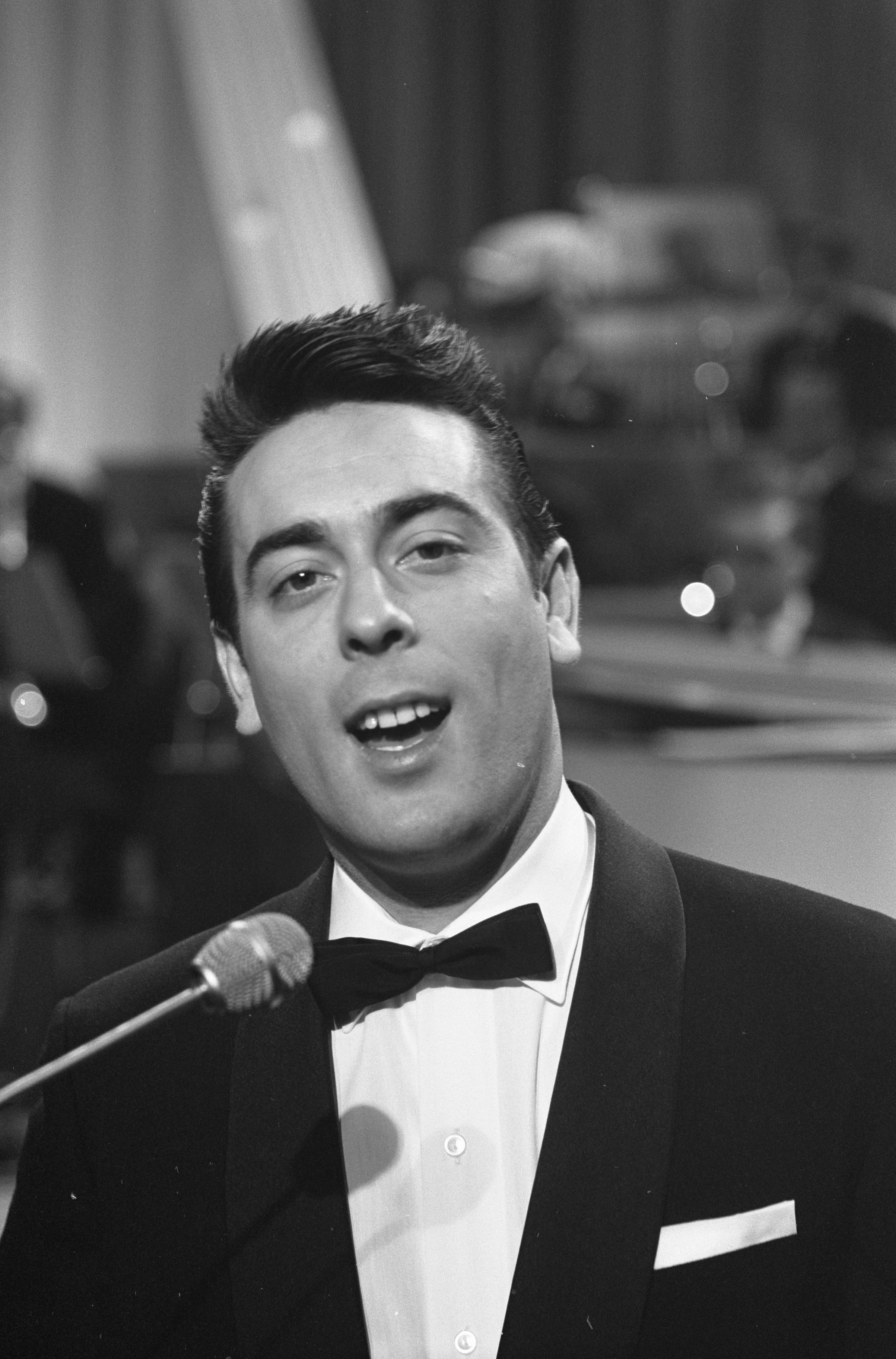 Gert Timmerman tijdens het Nationaal Songfestival 1962